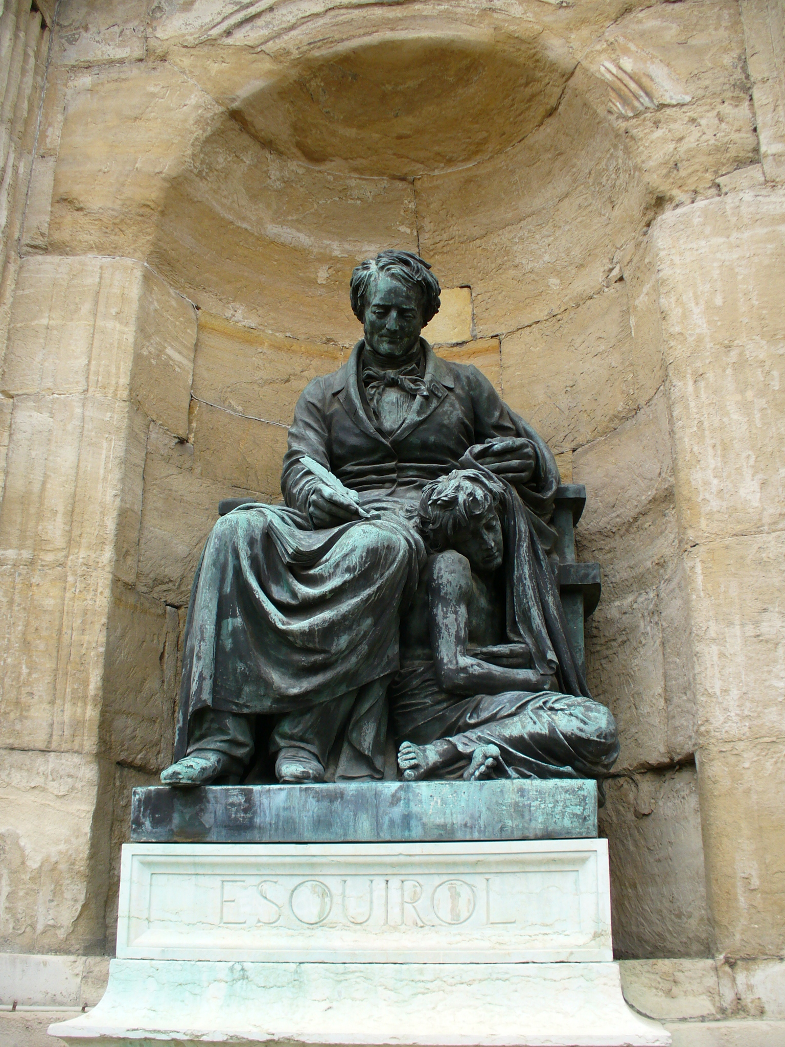 Statue de Jean-Étienne Esquirol à l'Hôpital Esquirol. Saint-Maurice (Val-de-Marne, France).